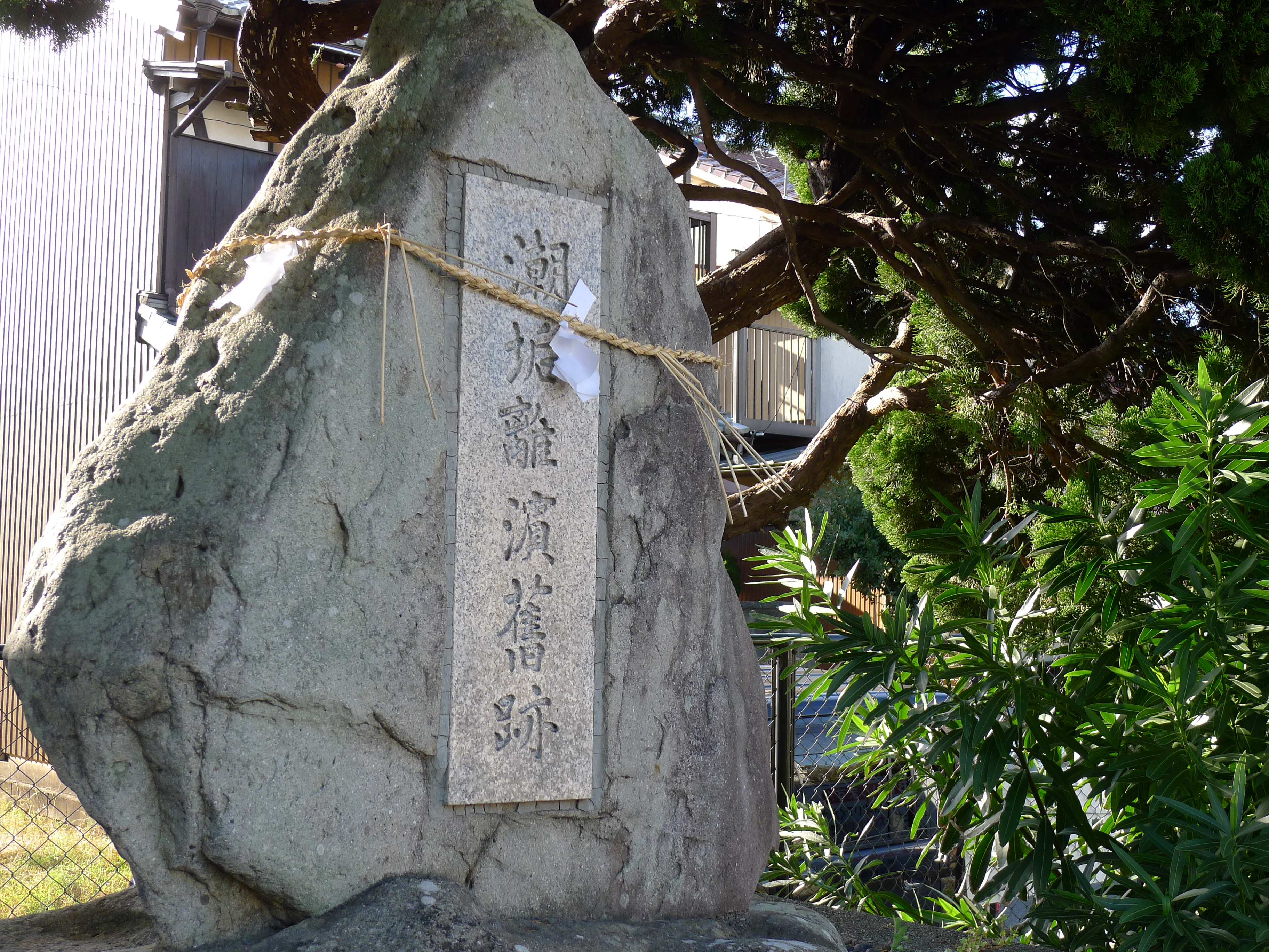 熊野古道紀伊路の潮垢離浜跡碑（和歌山県田辺市）